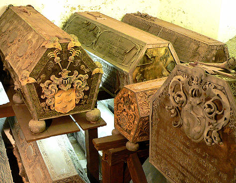 Gruft derer von Bartensleben in der St. Petrus Kirche in Vorsfelde, mit 14 Särgen, davon 3 Kindersärge, bestattet zwischen 1658 und 1695.